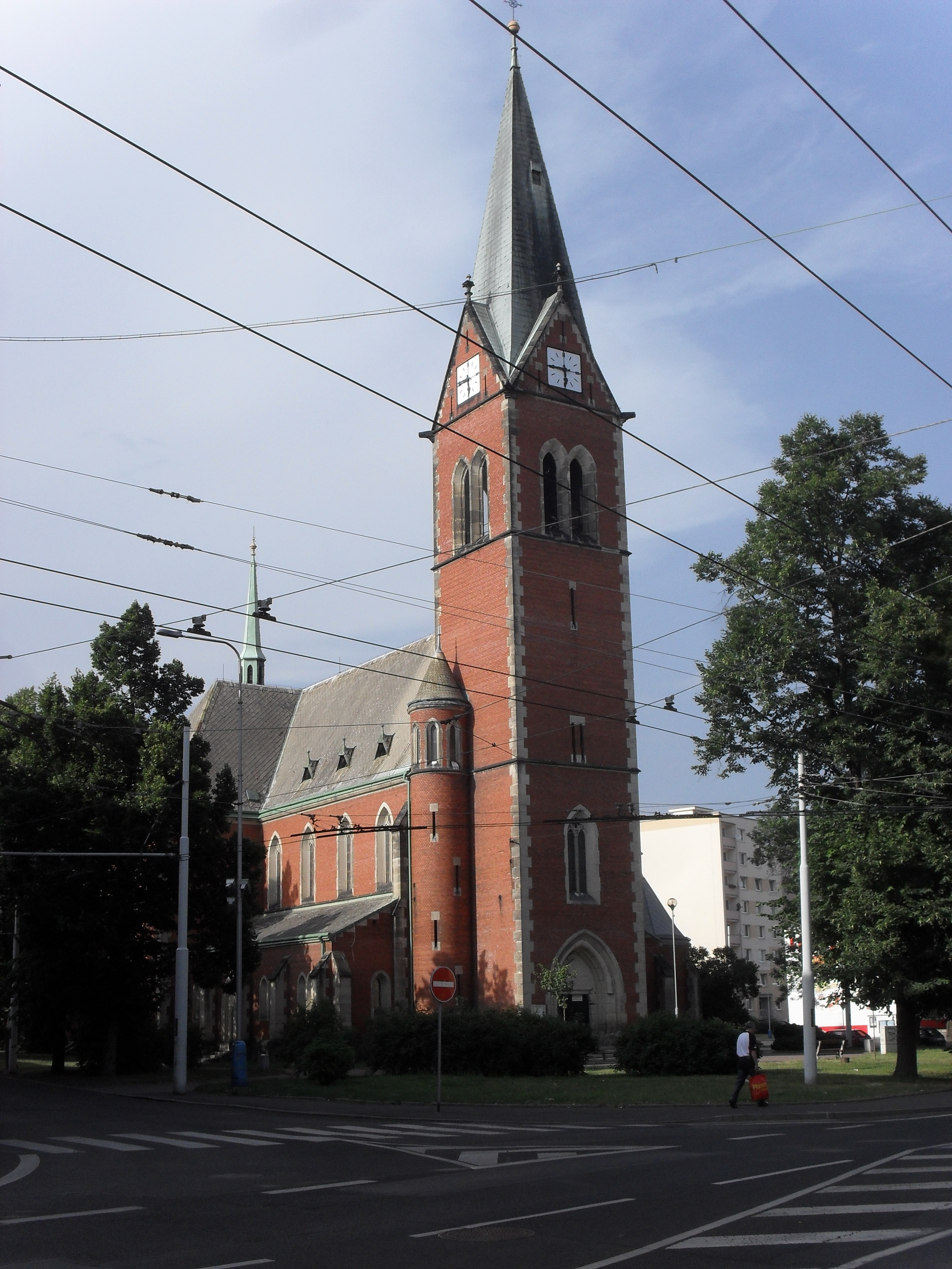 Červený kostel v Trnovanech.